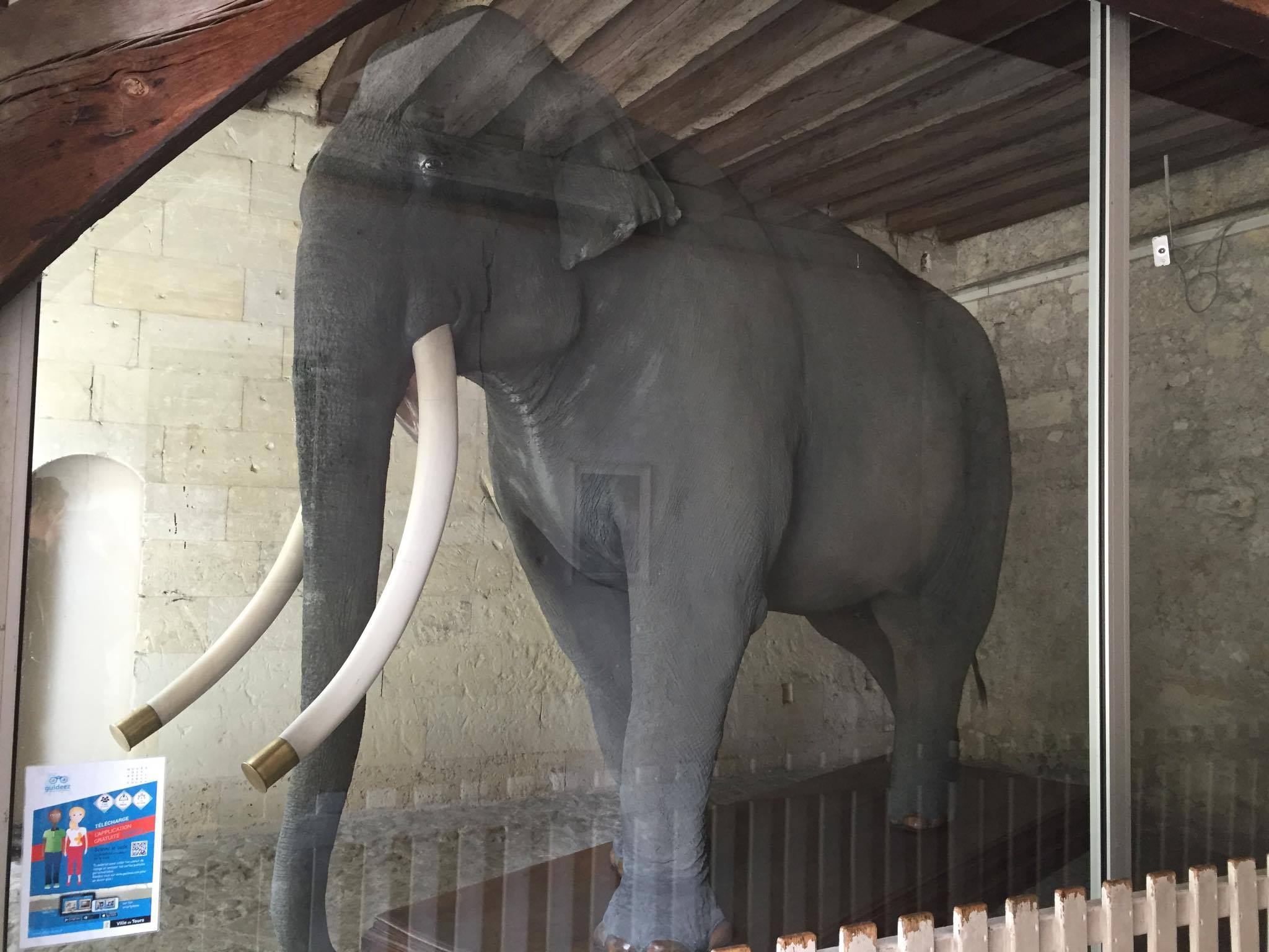 Fritz derrière la vitre au musée des beaux-arts de Tours